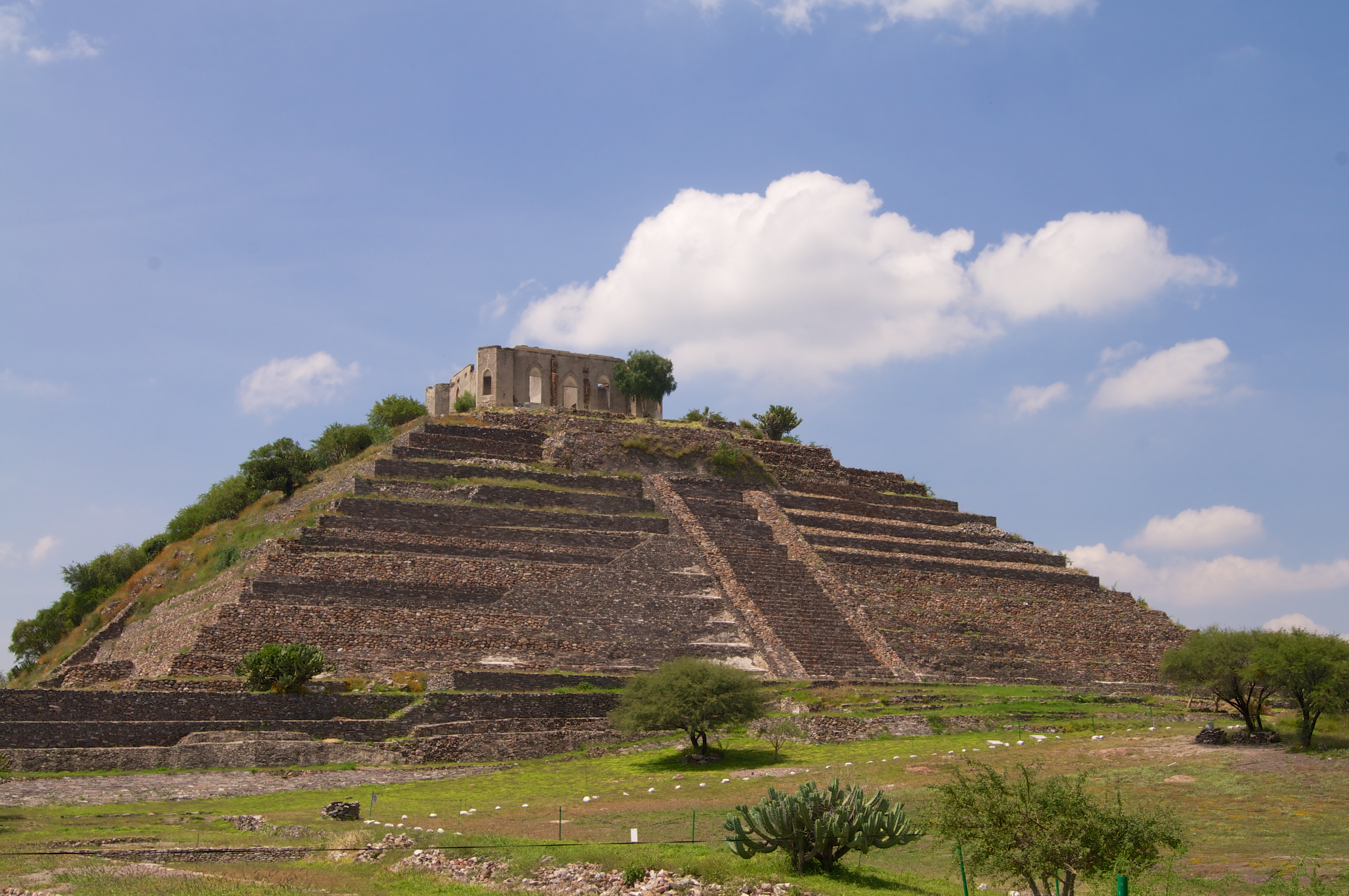 La imponente piramide del pueblito, parte del patrimonio cultural de la humanidad